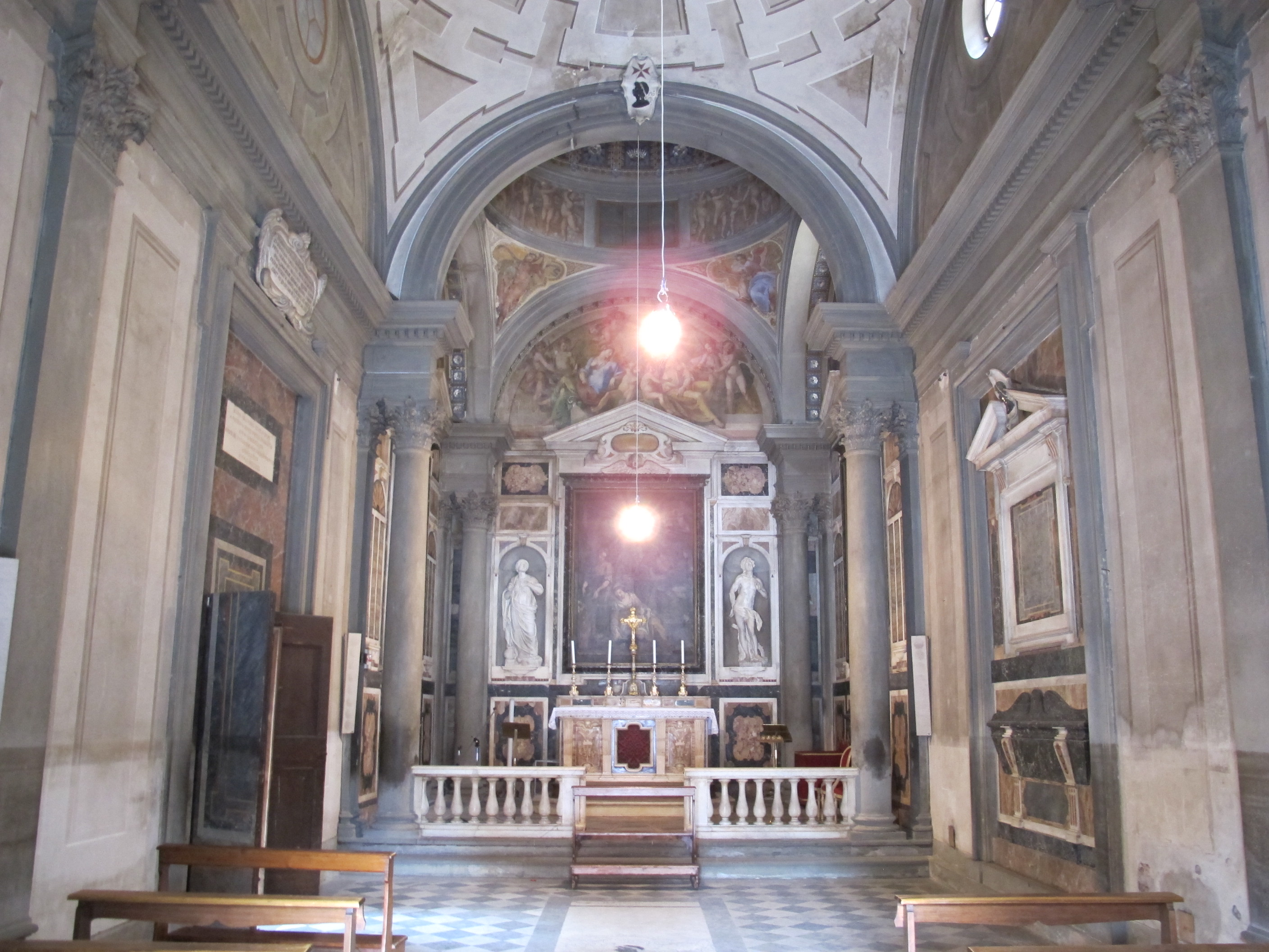 Ss. annunziata, cappella pucci